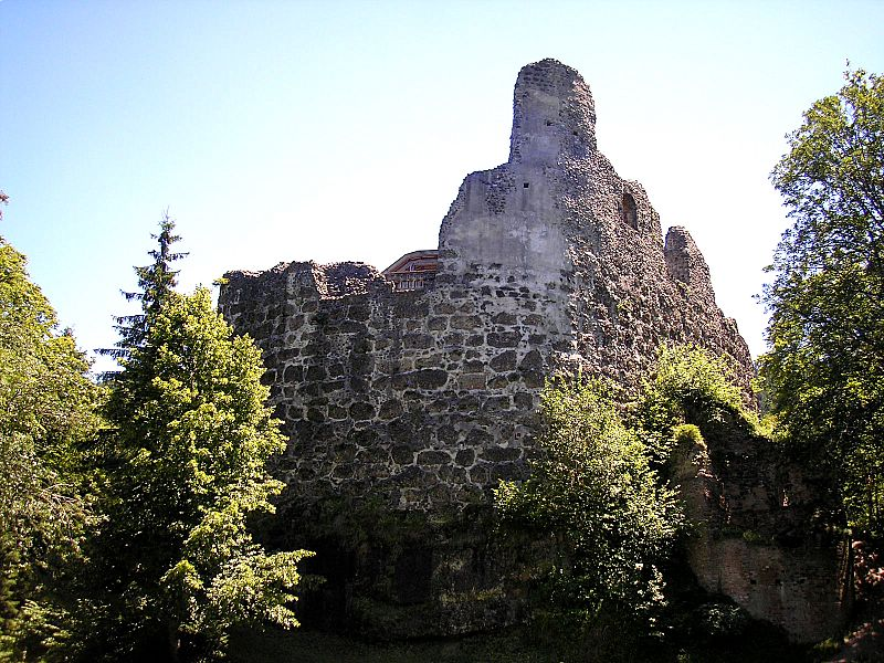 Burg Alttrauchburg (Markt Weitnau, Landkreis Oberallgäu, Bayerisch-Schwaben). Hauptburg von Norden. Eigene Aufnahme, Juli 2007 / Alttrauchburg castle near Weitnau (Bavaria, Germany). Central castle from the north. Own photo, July 2007